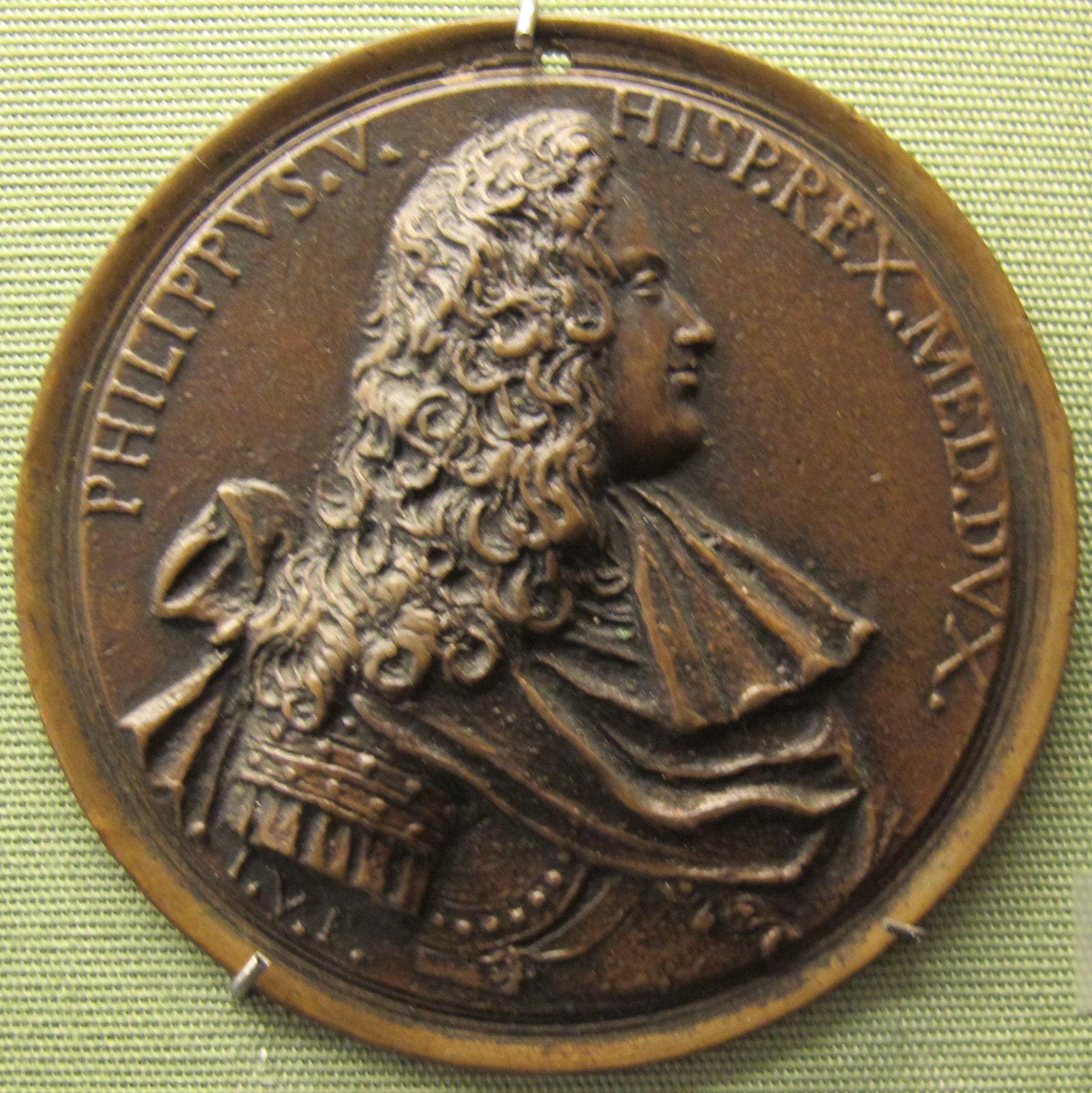 Filippo V di Spagna (1683-1746)